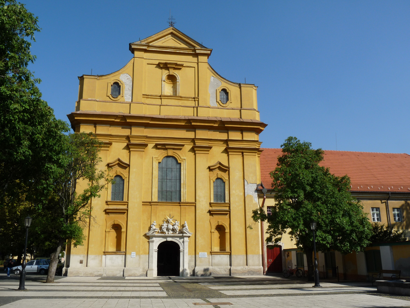 Ferences templom (Szentháromság) (Szolnok, Szentháromság tér)